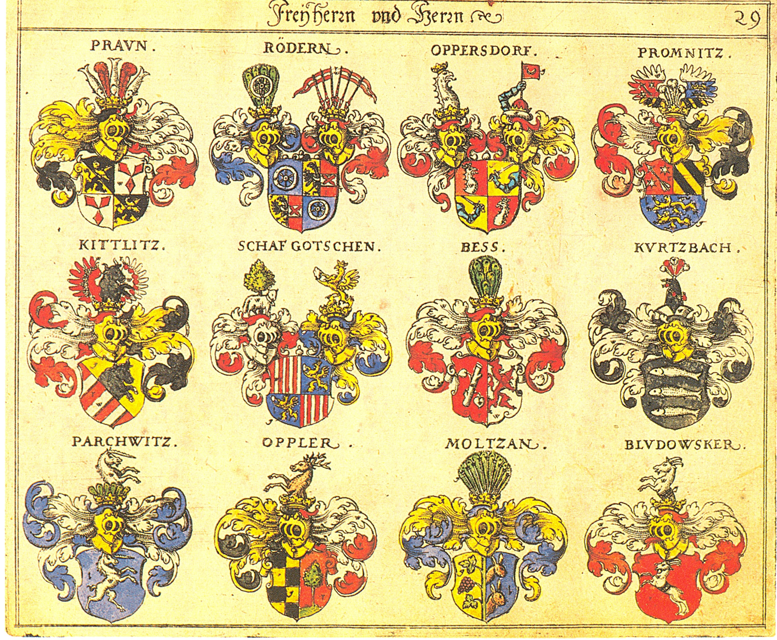 Johann Siebmacher: New Wappenbuch eingescannt aus: Horst Appuhn (Hrsg.), Johann Siebmachers Wappenbuch. Die bibliophilen Taschenbücher 538, 2. verb. Aufl , Dortmund 1989 Freiherren und Herren Blatt 29